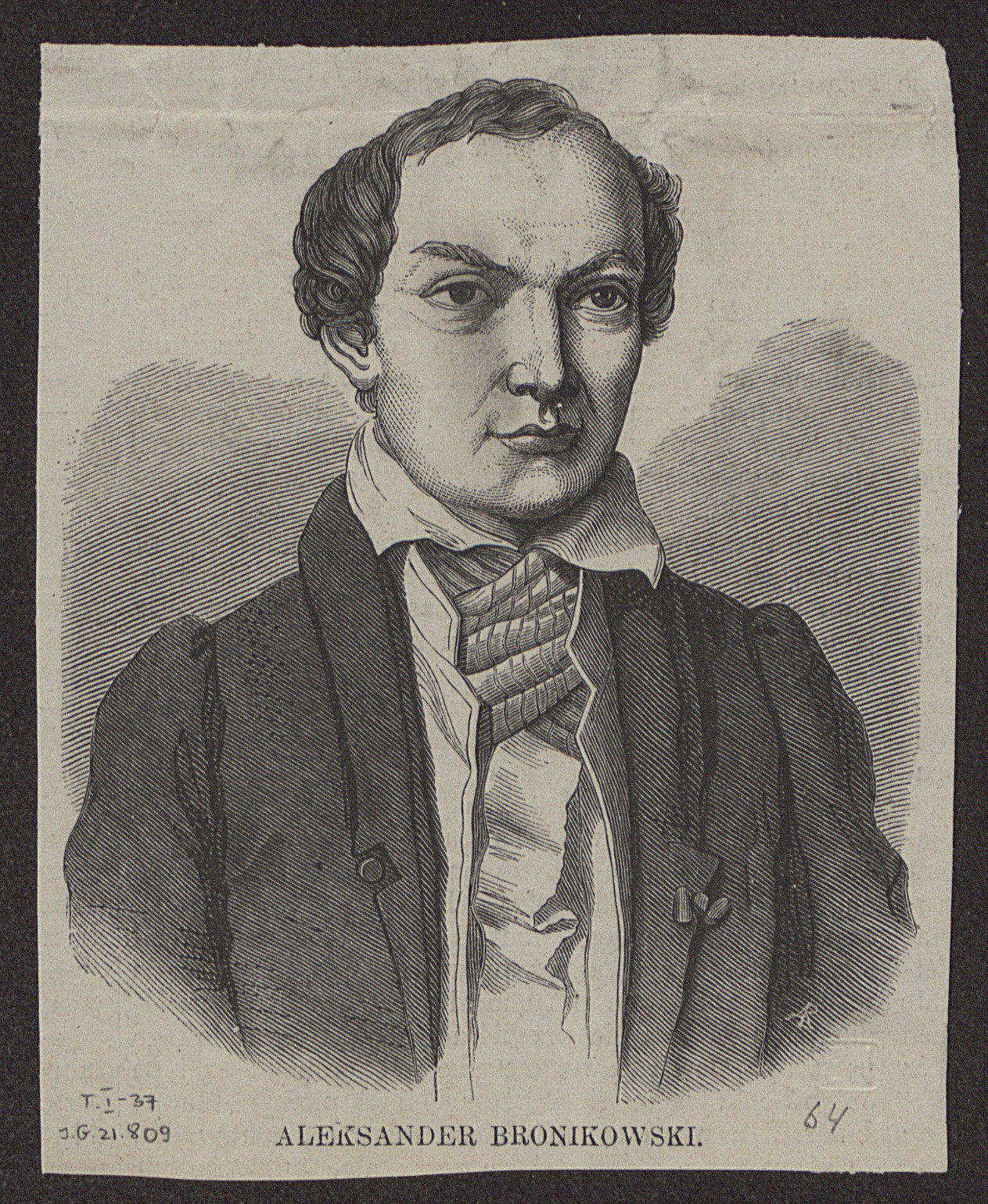 Alexander von Oppeln-Bronikowski